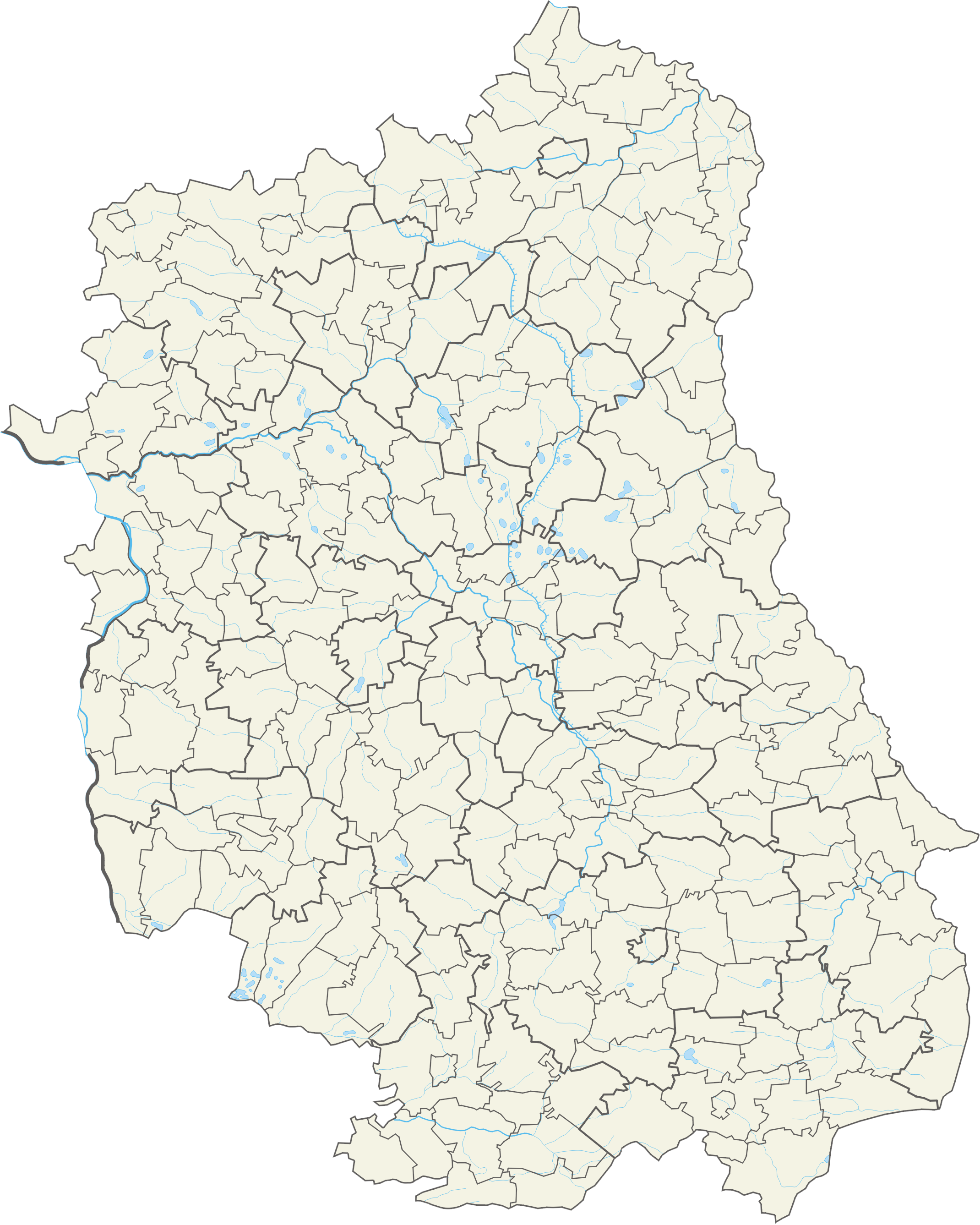 Województwo lubelskie – powiaty i gminy Współrzędne graniczne mapy: N: 52.2878° N S: 50.2519° N W: 21.6157° E E: 24.1458° E